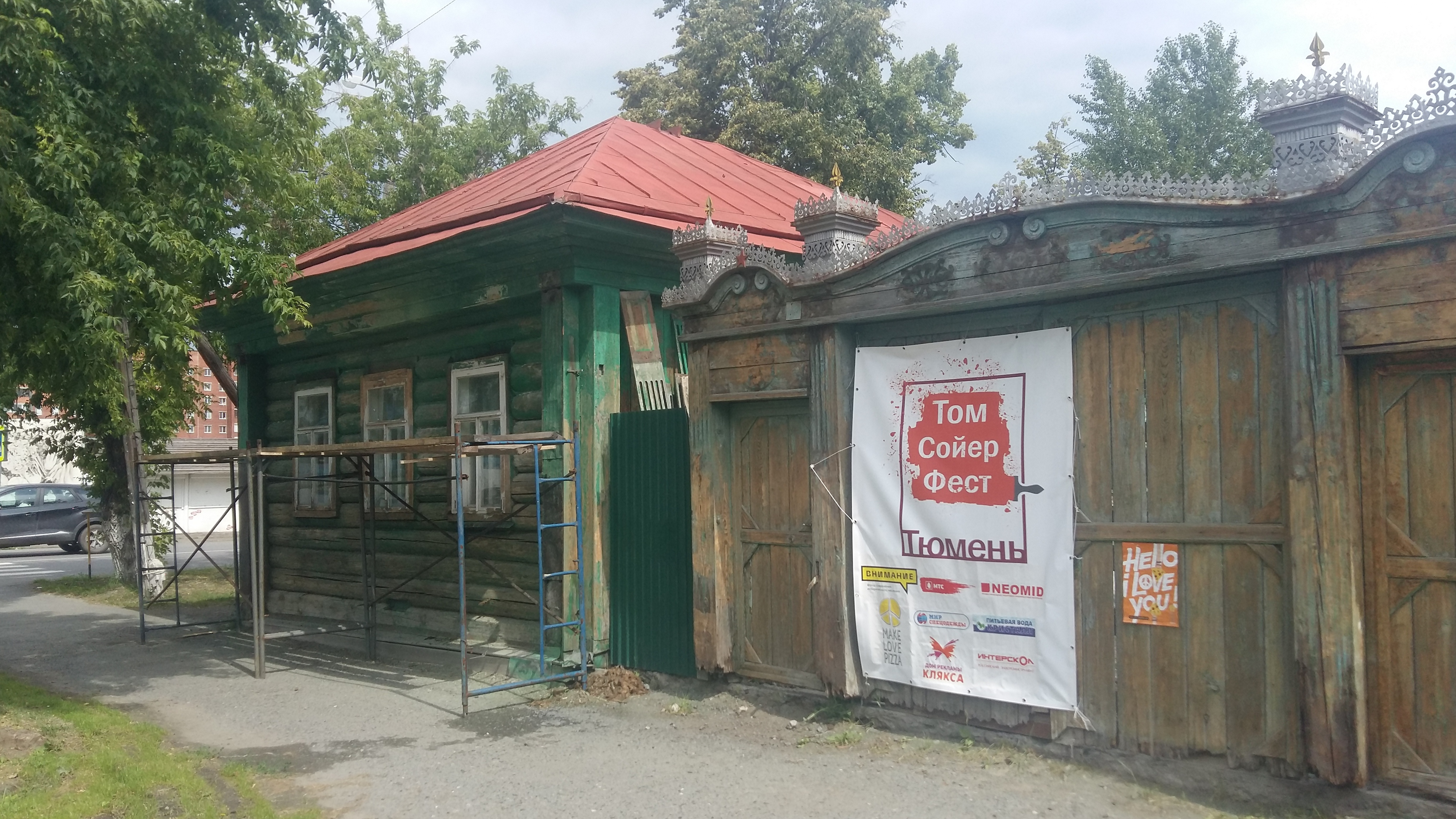 Дом по ул. Льва Толстого, 50 в городе Тюмени, который восстанавливается волонтёрами движения "Том Сойер Фест".